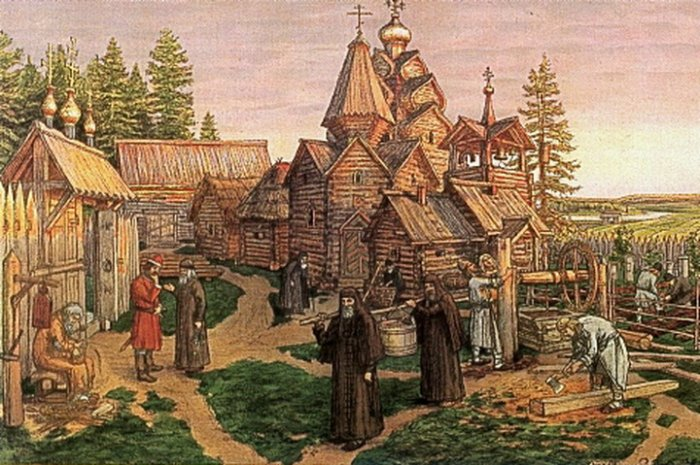 № 23: А.М. Васнецов. Монастырь в Московской Руси. (XIII-XVII вв.) - 1908